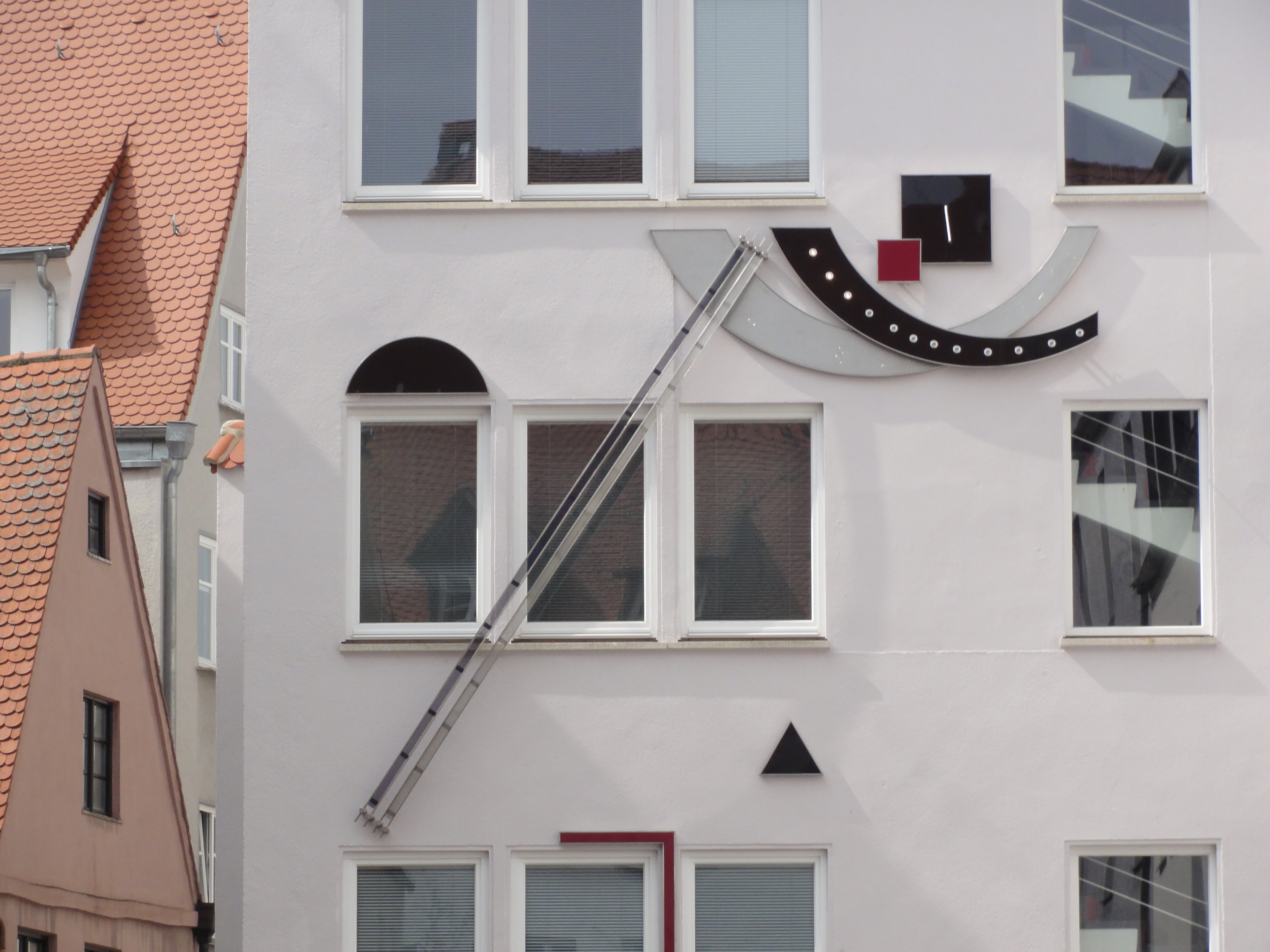 Augsburg